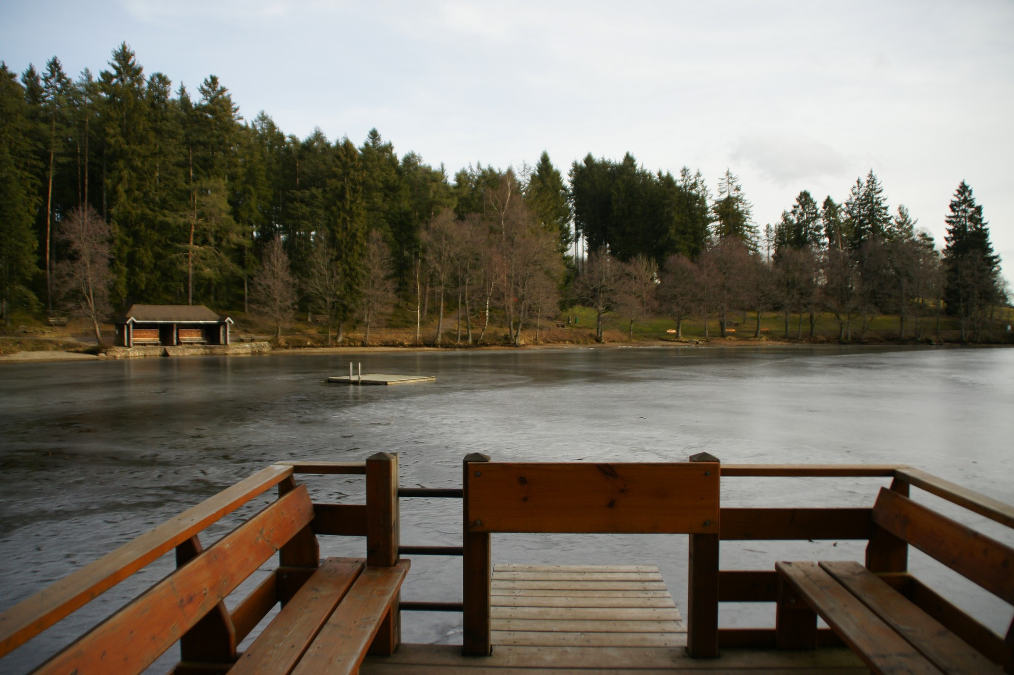 Schlüchtsee - Badesee bei Grafenhausen, am anderen Ufer das nach Geschlechtern getrennte Badehäuschen aus dem Anfang des 20. Jahrhunderts